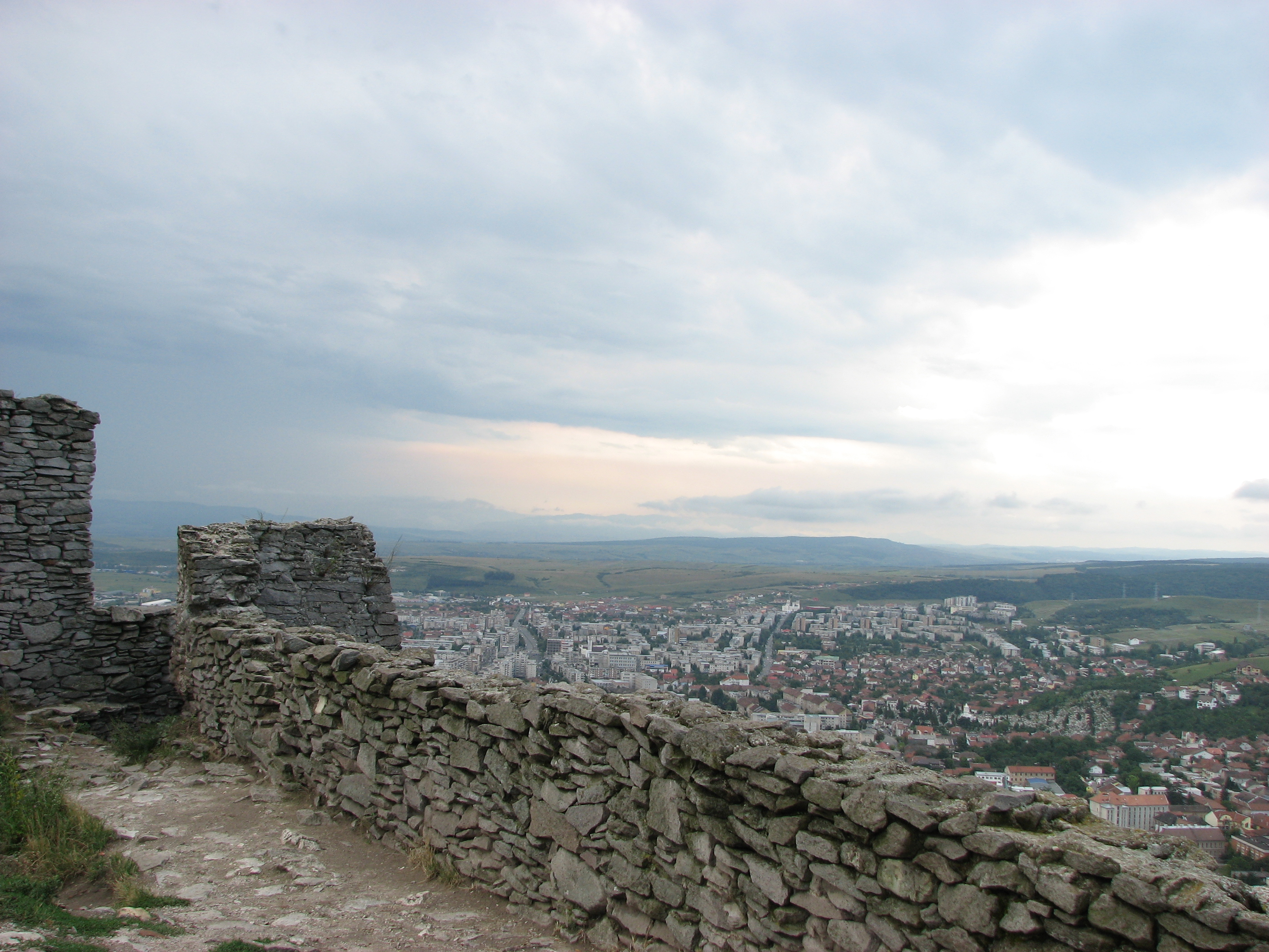 Deva's stronghold